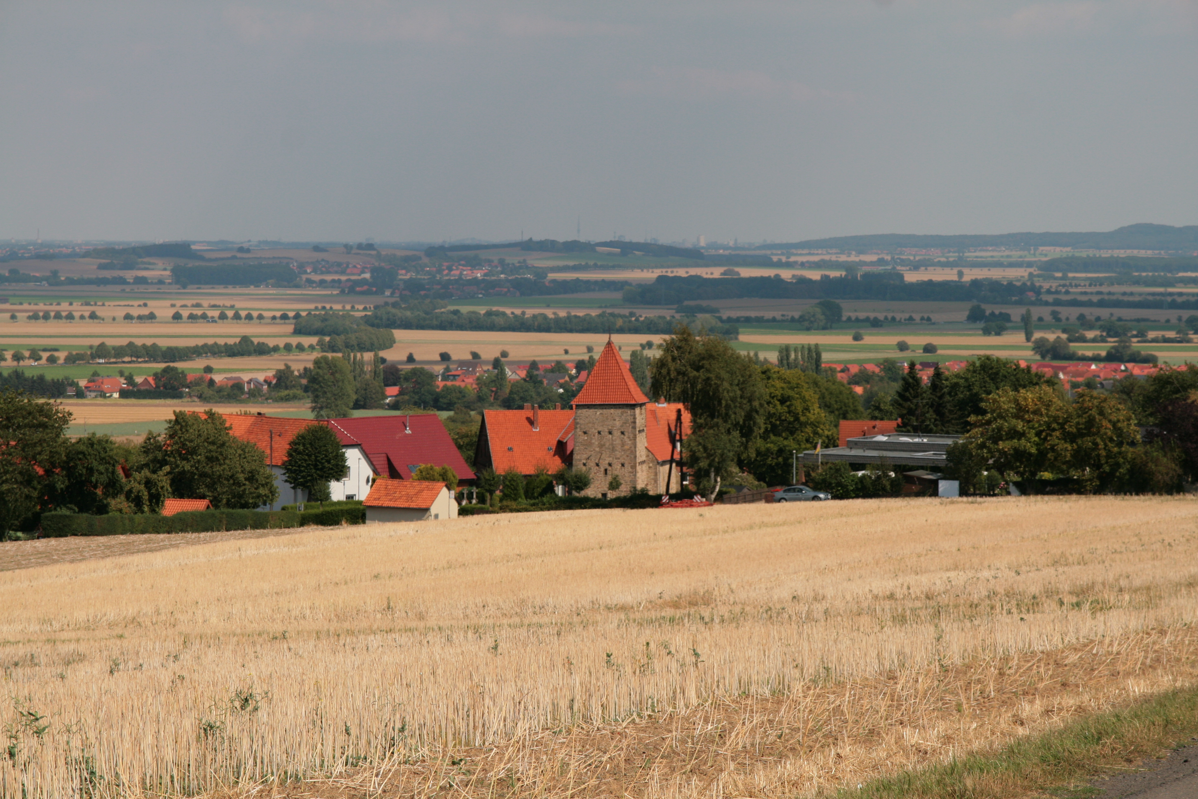 In Deutschland, Niedersachsen: Aussicht von der Bantorf-Höhe (Barsinghausen) auf Kirche